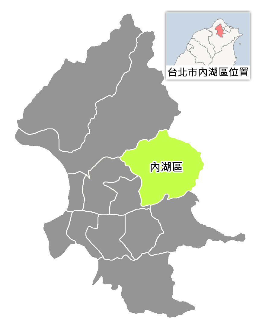 臺北市內湖區位置。